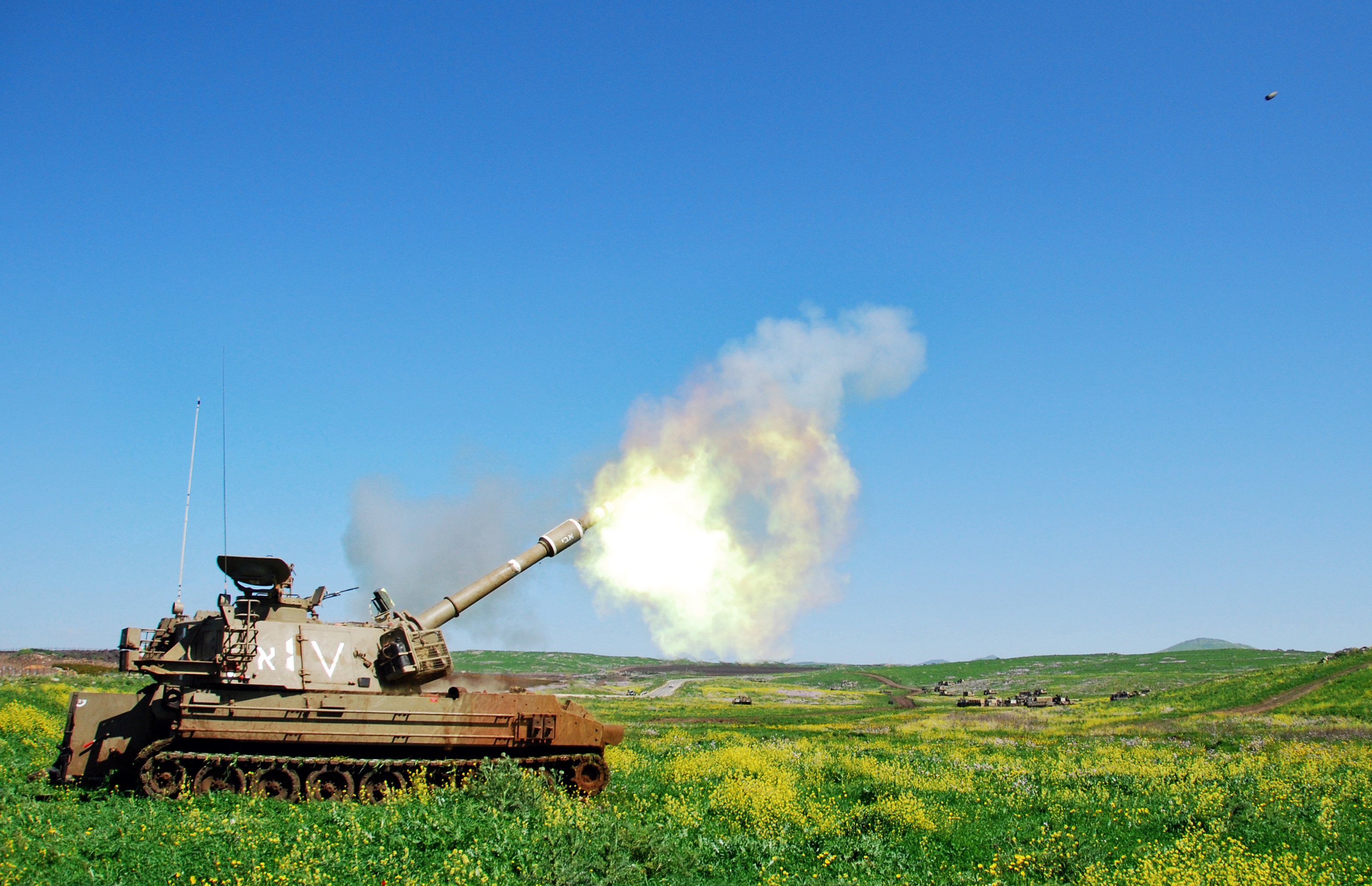 תומת דוהר יורה באימון. לא במלחמה או מבצע, באימון!